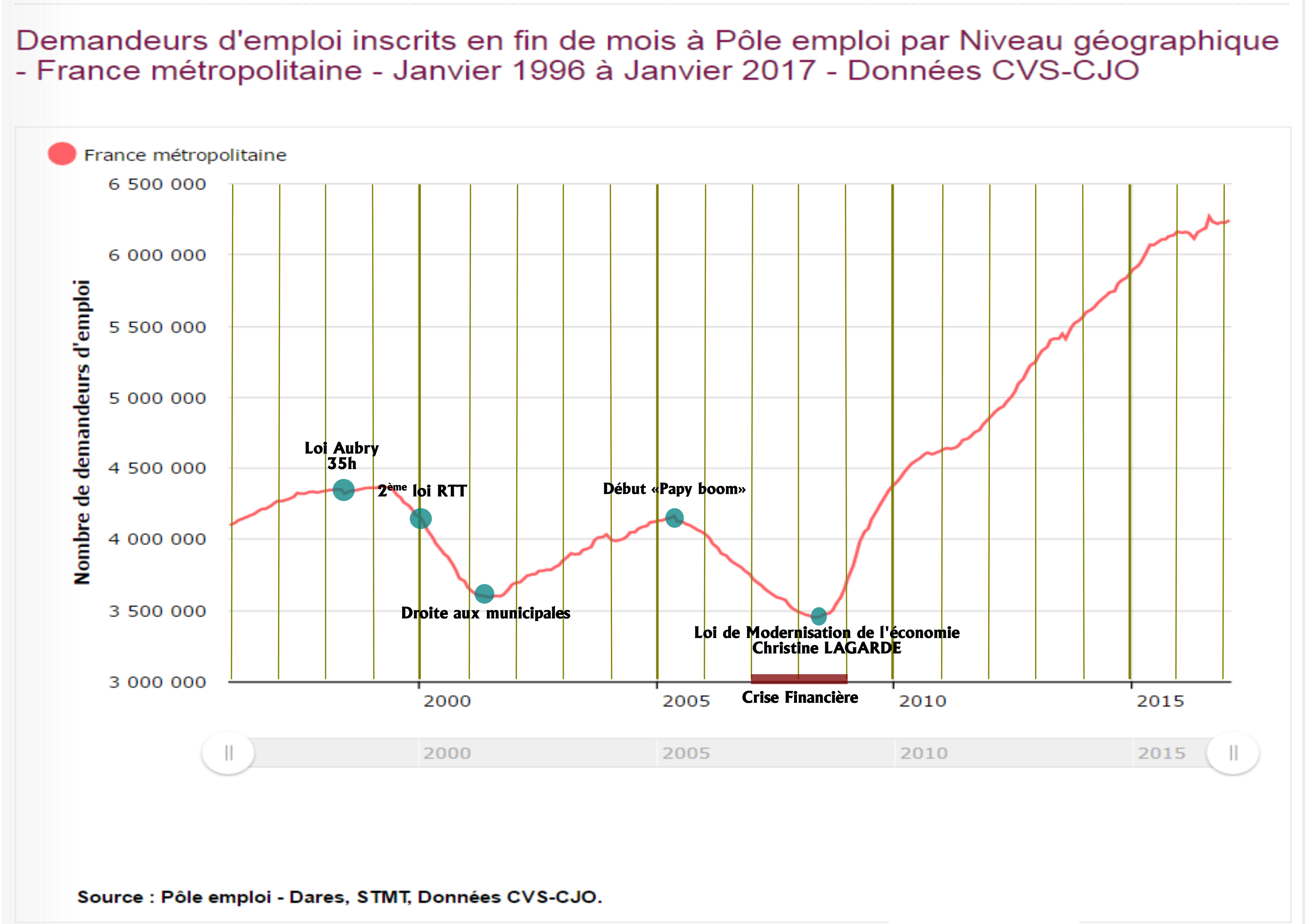 Effet sur les inscrits demandeurs d'emploi à pôle emploi